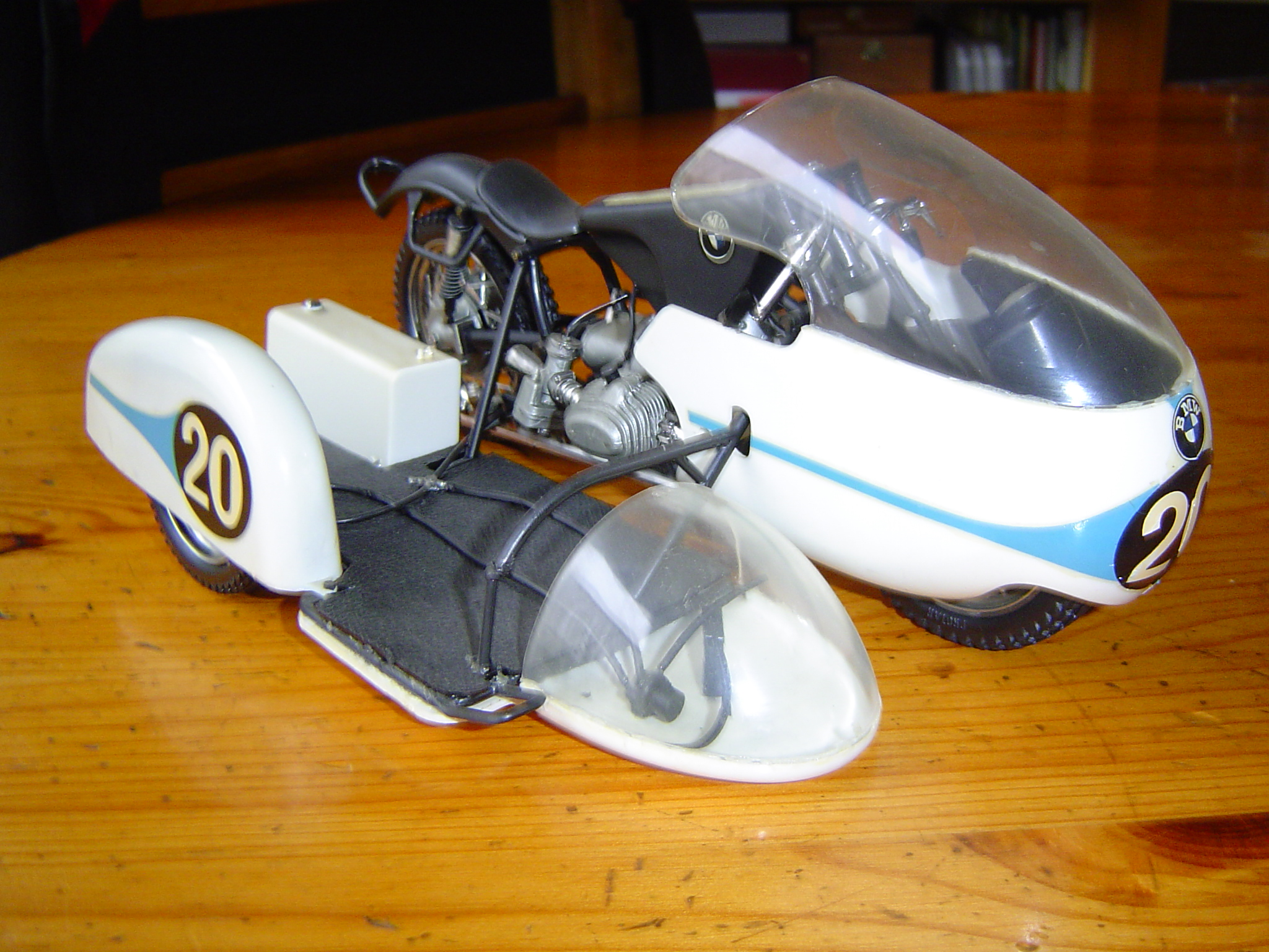 Schaalmodel van een BMW zijspanracer uit 1961. BMW won de wereldtitel bij de zijspannen tussen 1954 en 1974 19 keer